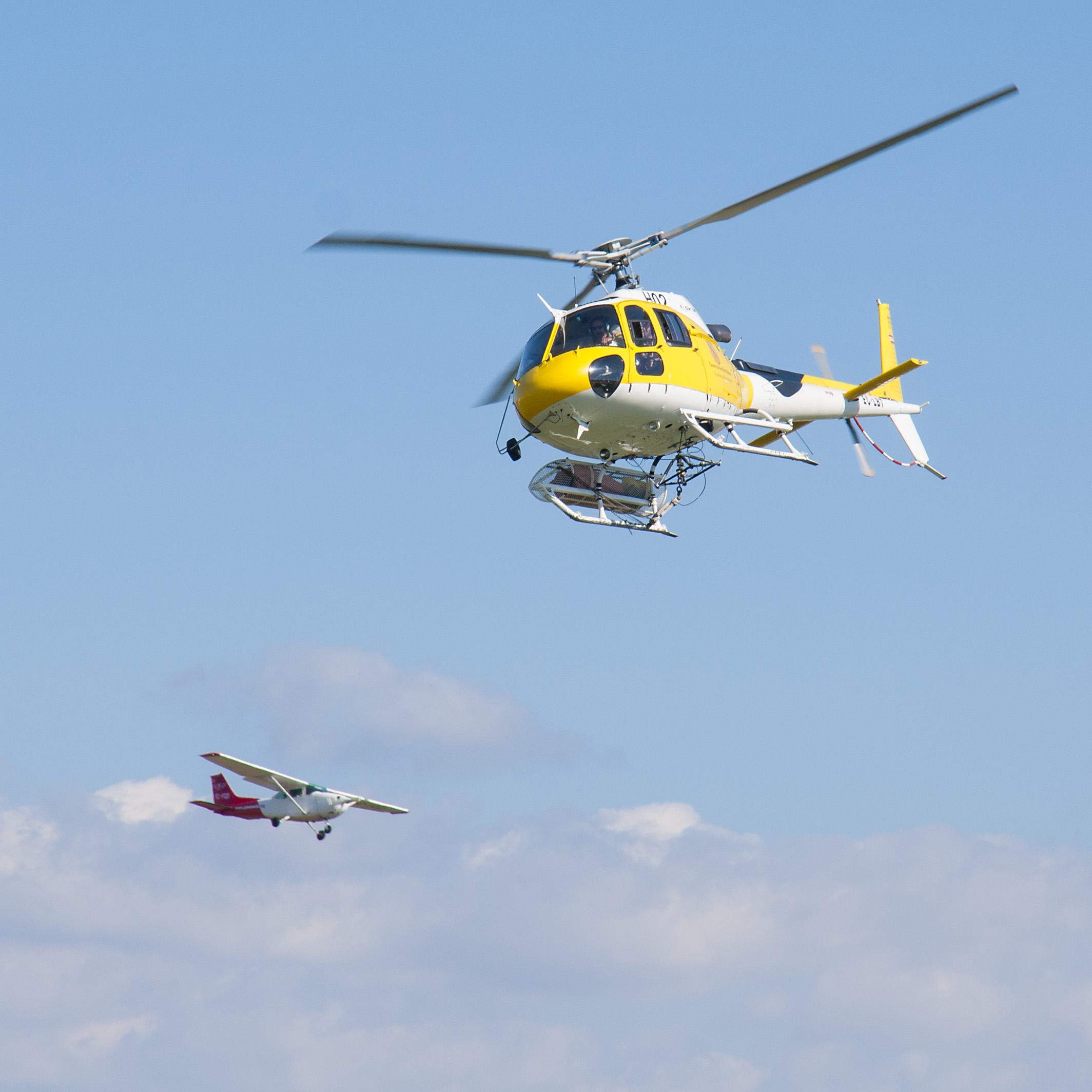 Fotos del acto de homenaje a los pilotos de los medios aéreos contraincendios que participaron en la extinción del fuego forestal de Andratx